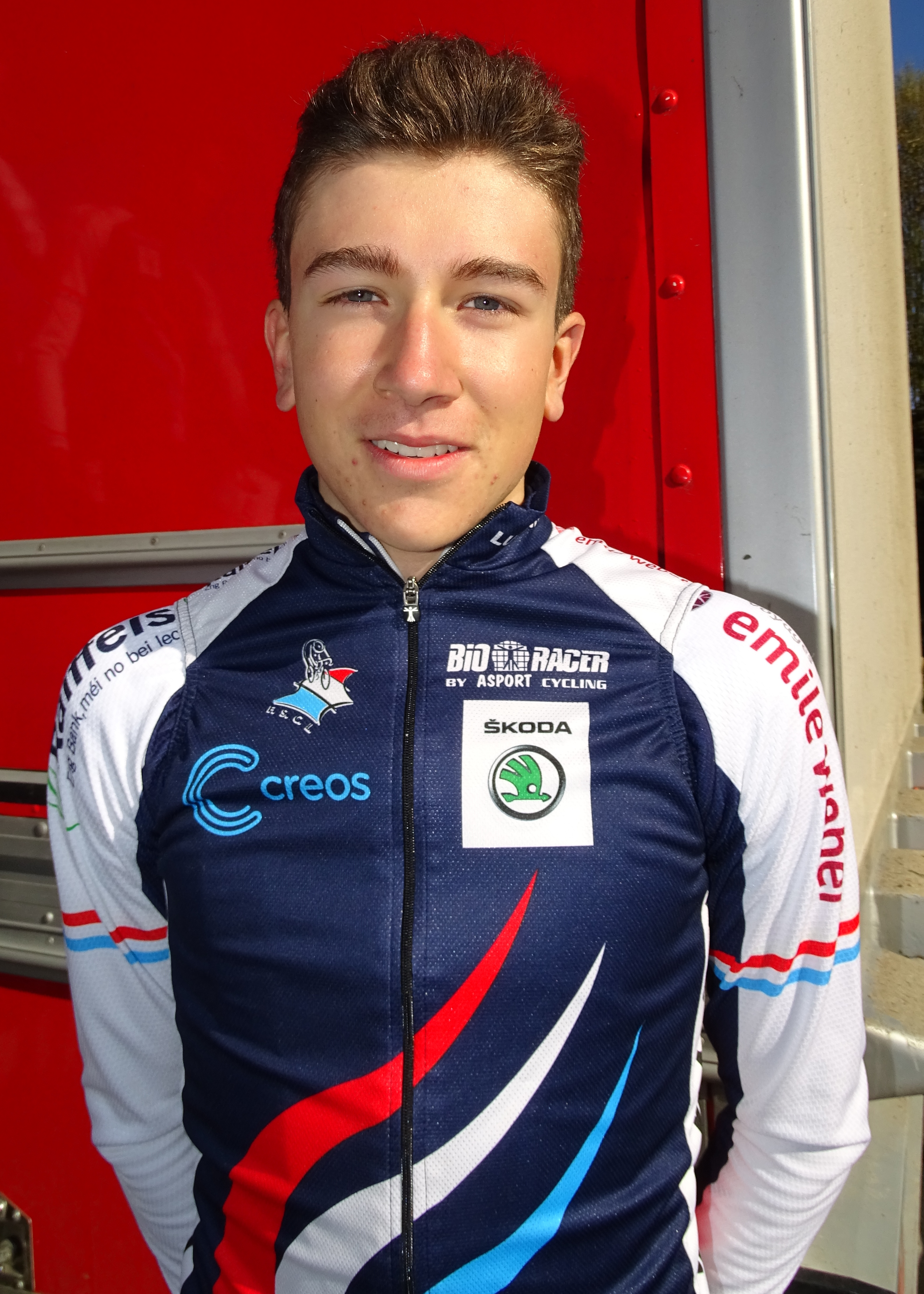 Reportage réalisé le dimanche 10 avril à l'occasion du départ du Paris-Roubaix juniors 2016 à Saint-Amand-les-Eaux, France.